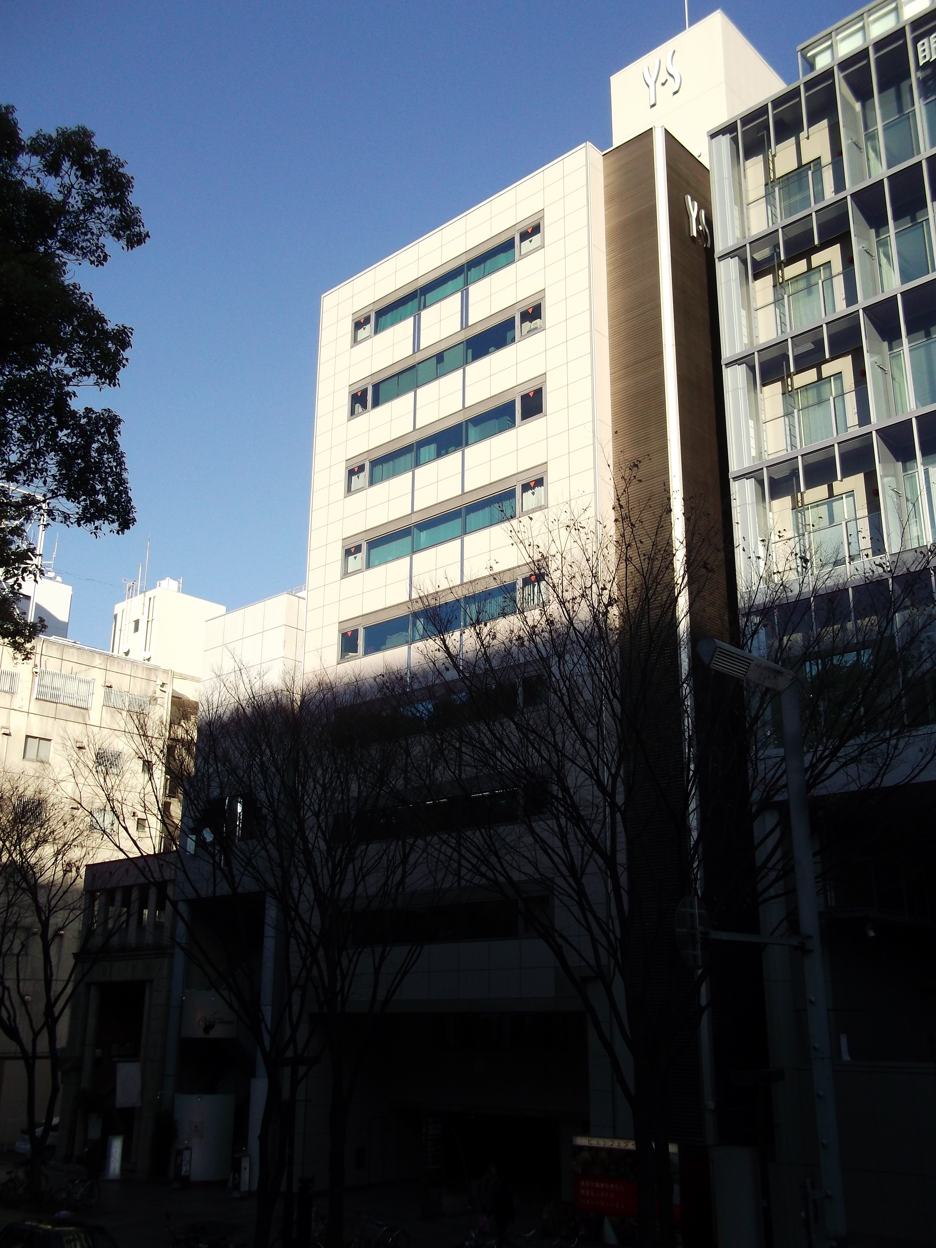 名古屋市中区栄五丁目の吉本興業東海支社を西側公道南側より撮影